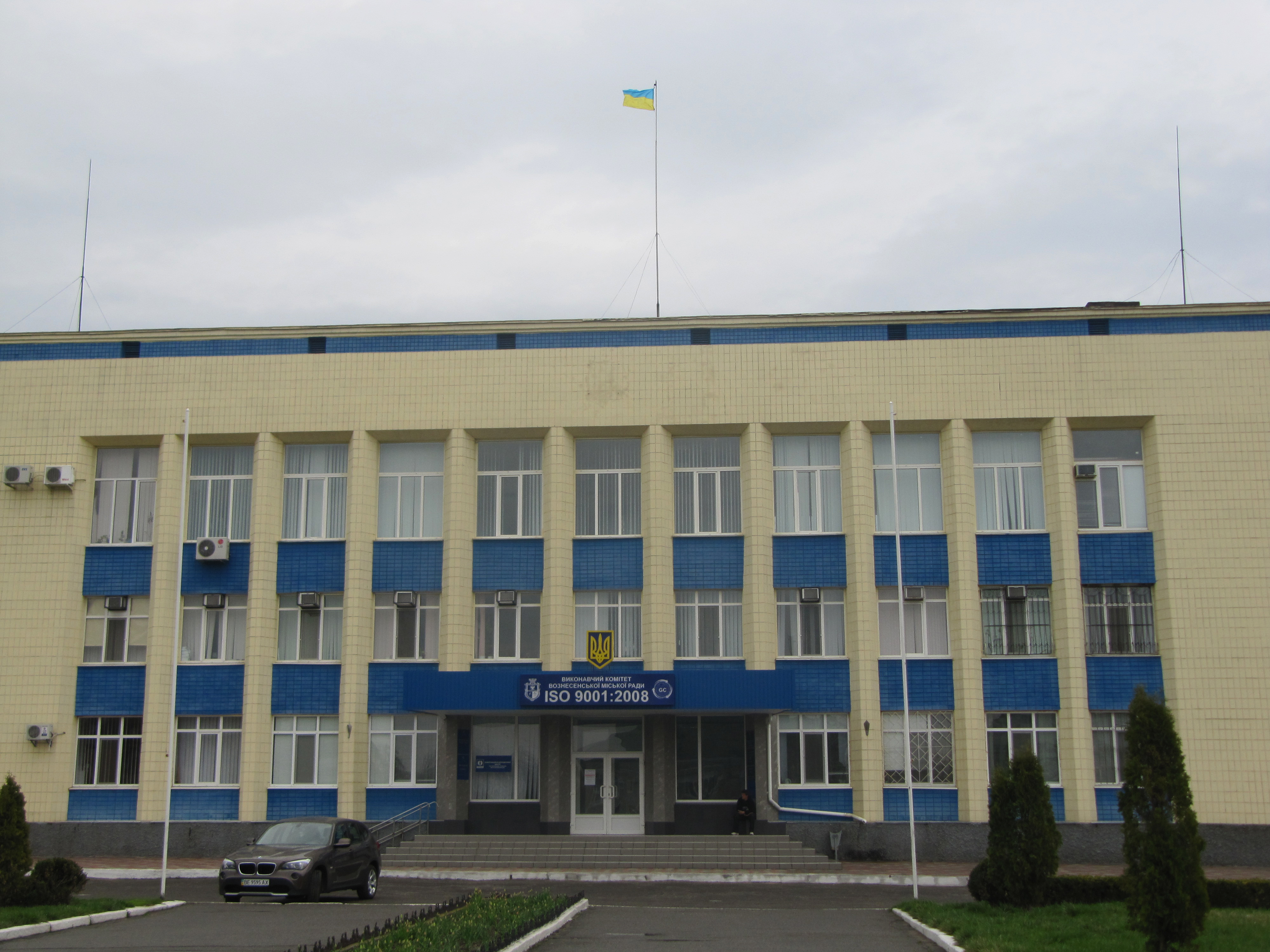 Вознесенськ, Вознесенський міськвиконком Миколаївська весна у Вікіпедії